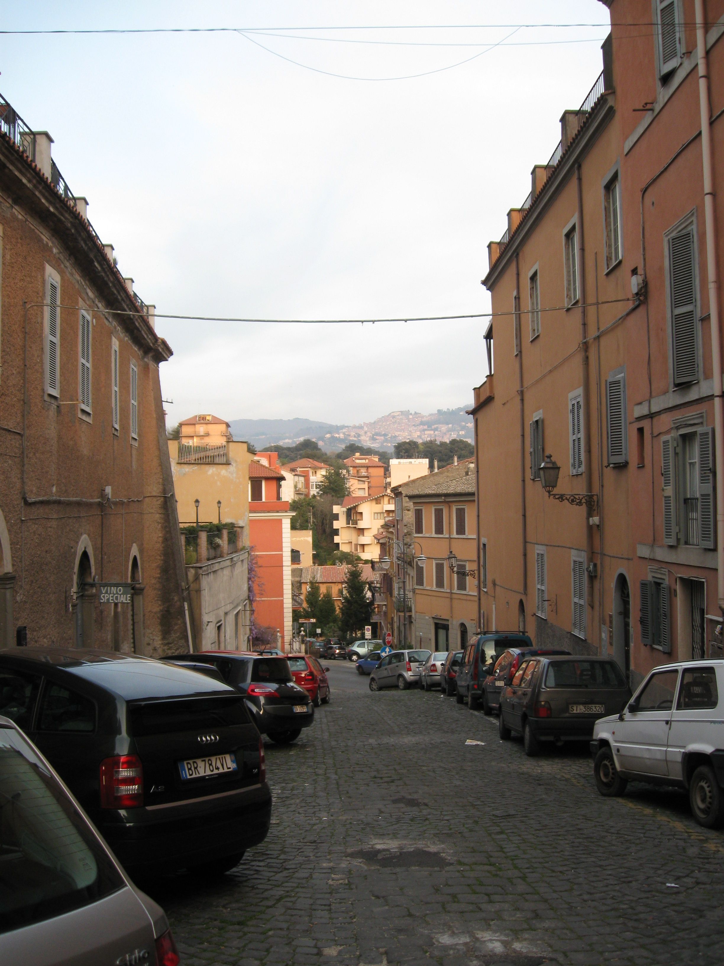 Via Cesare Battisti a Marino (RM), e sullo sfondo Rocca di Papa e Monte Cavo